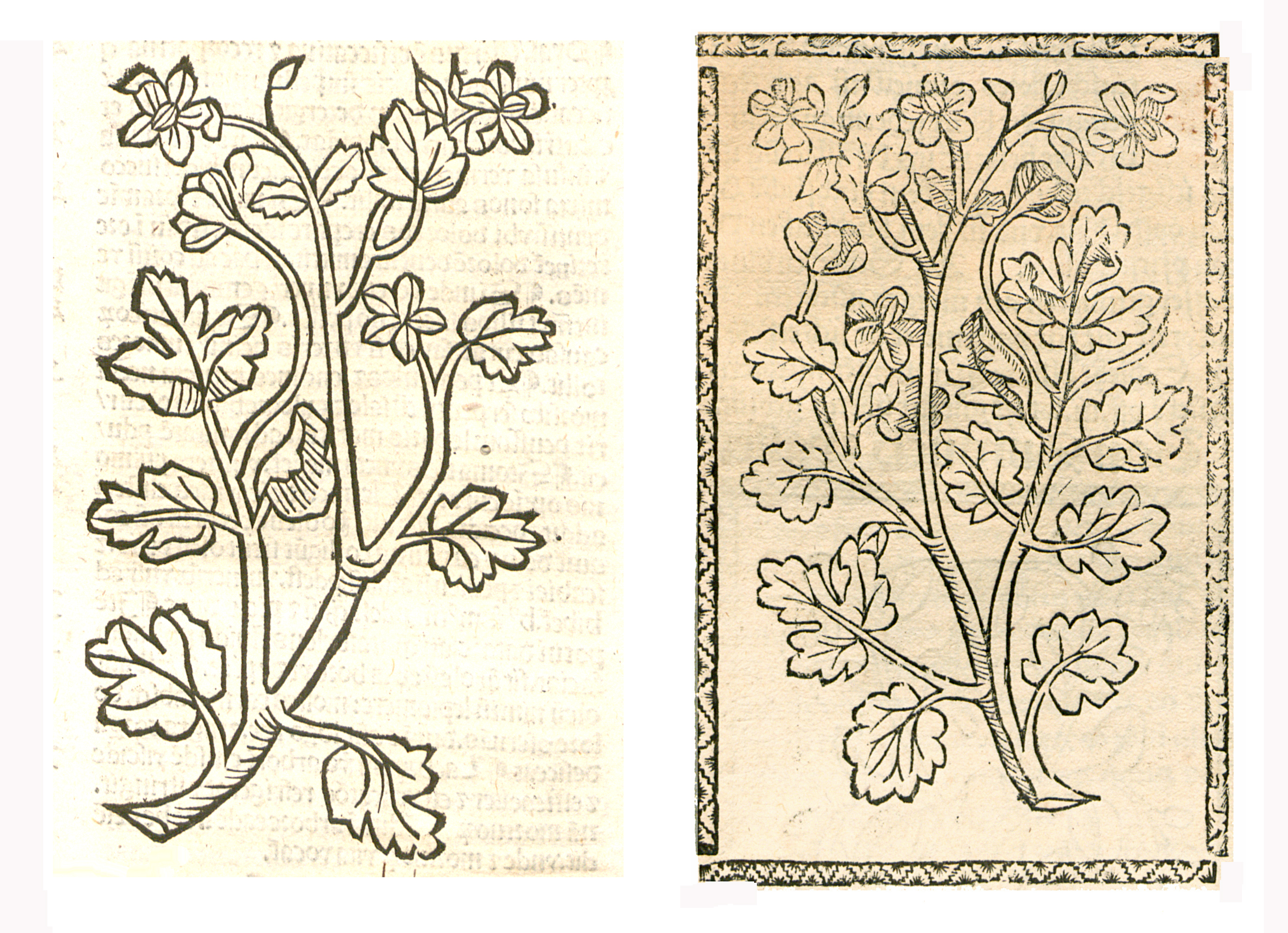 Abbildung von Schel Wurtz (Chelidoinium majus)